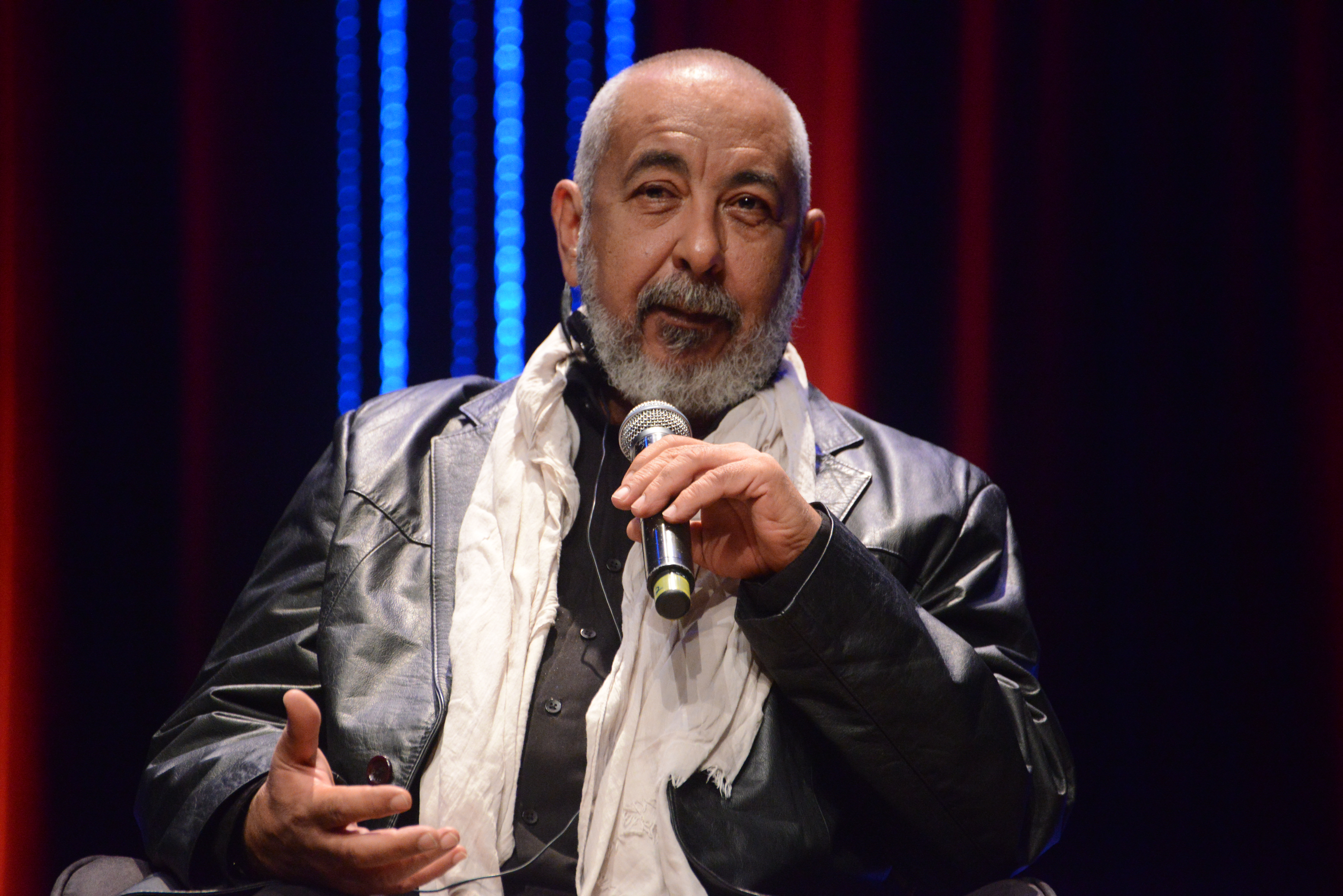 Convidado: Leonardo Padura, escritor cubano. Data: 21 de agosto de 2017 Local: Salão de Atos da UFRGS Crédito das imagens: Fronteiras do Pensamento / Luiz Munhoz